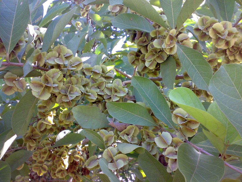 Hình cây Trâm bầu Nguồn gốc; tự chụp tại Cần Thơ